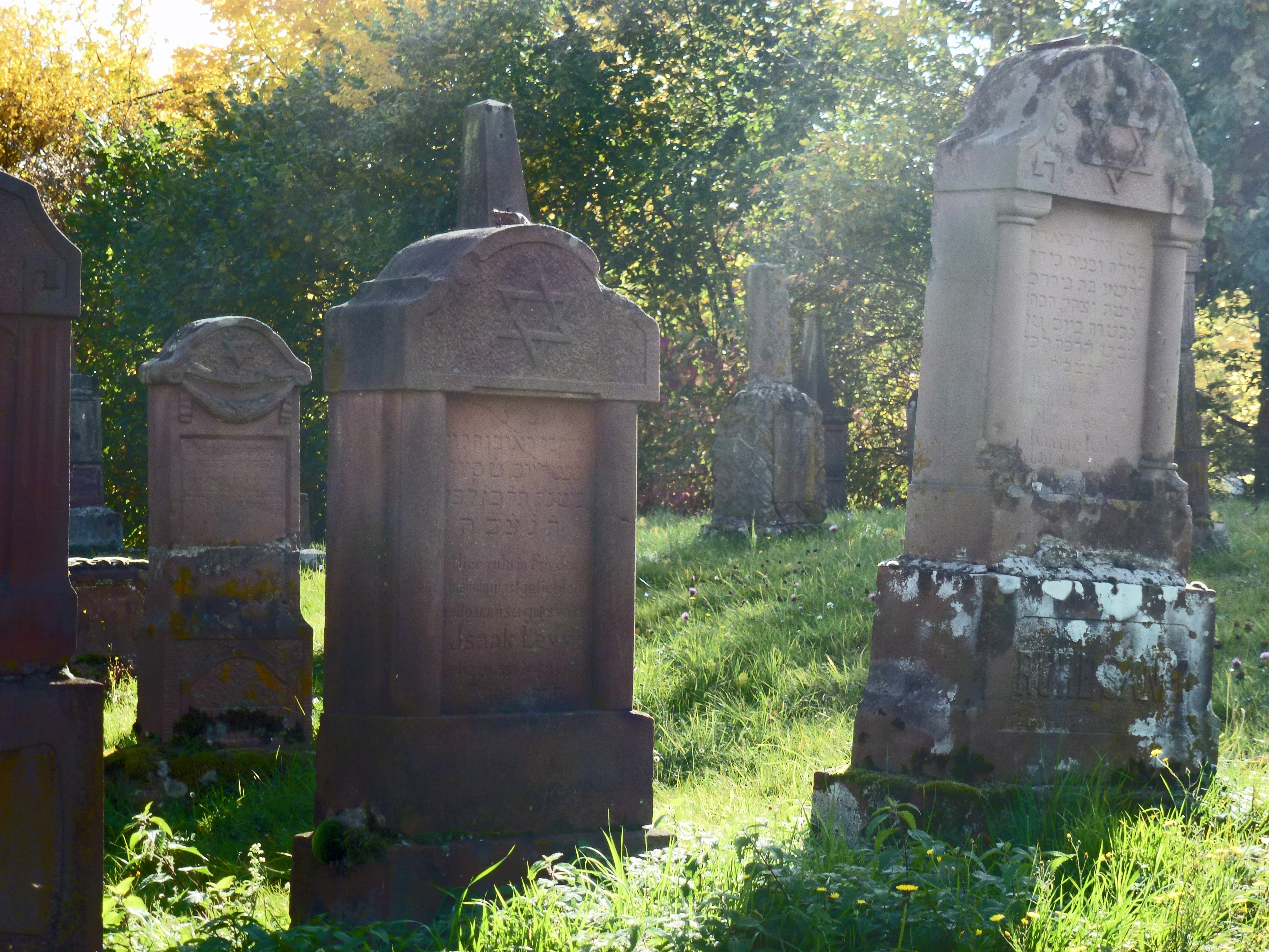 Jüdischer Friedhof Detzemer Straße Leiwen